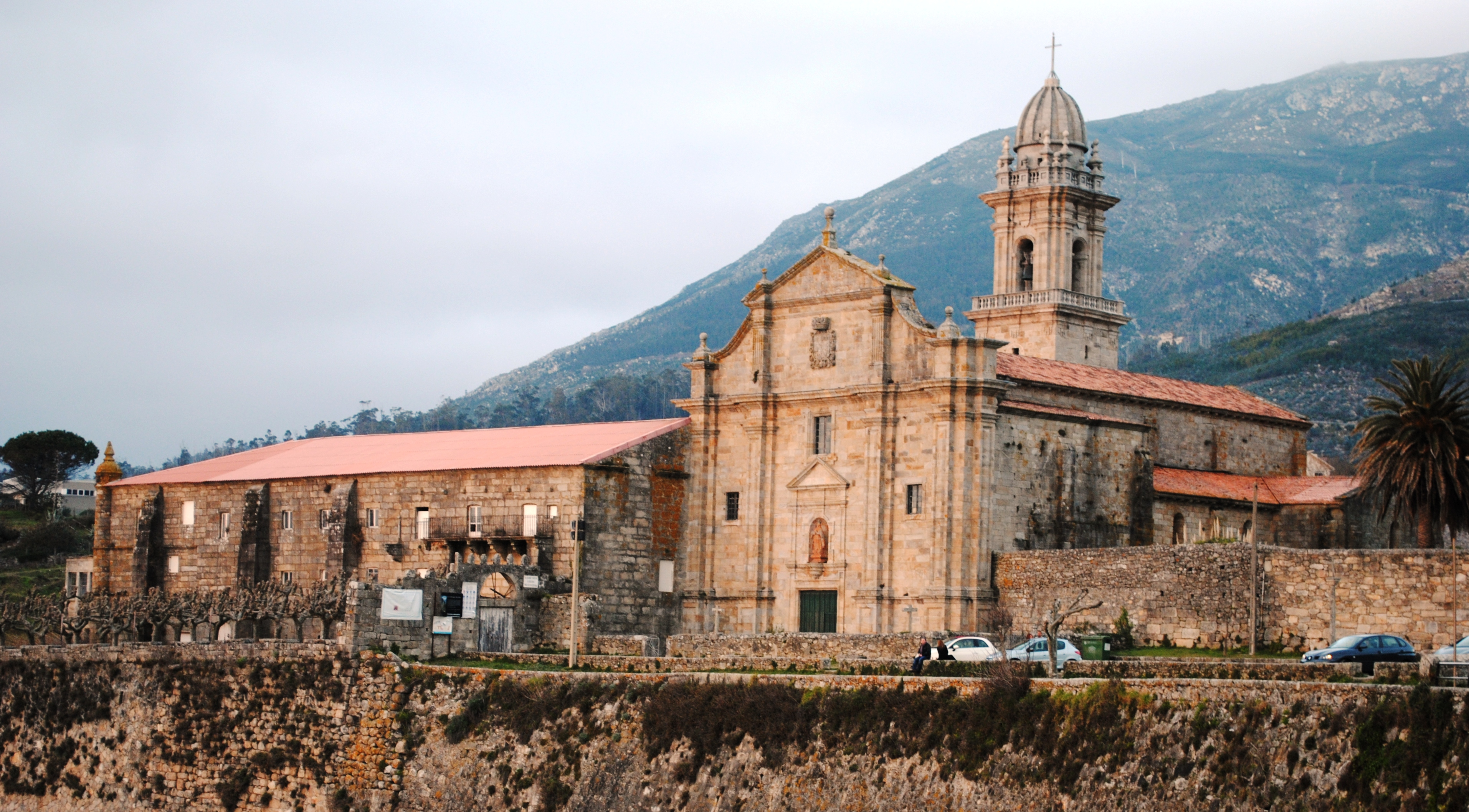 Oia, Mosteiro, 2012